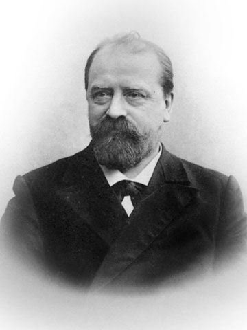 Михаил Иванович Коновалов (1858—1906) — химик-органик.